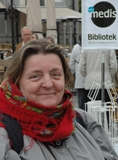 Britt-Marie Ingdén-Ringselle på Söderandans dag 2007. Bilden är tagen av Krister Sundgren informationsansvarig i Södermalms stadsdelsförvaltning i Stockholm